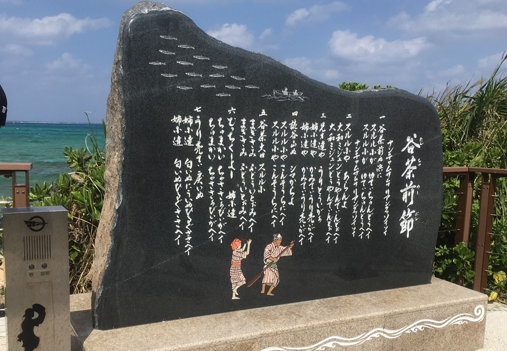 谷茶前の碑。ボタンを押すと音楽が流れる。